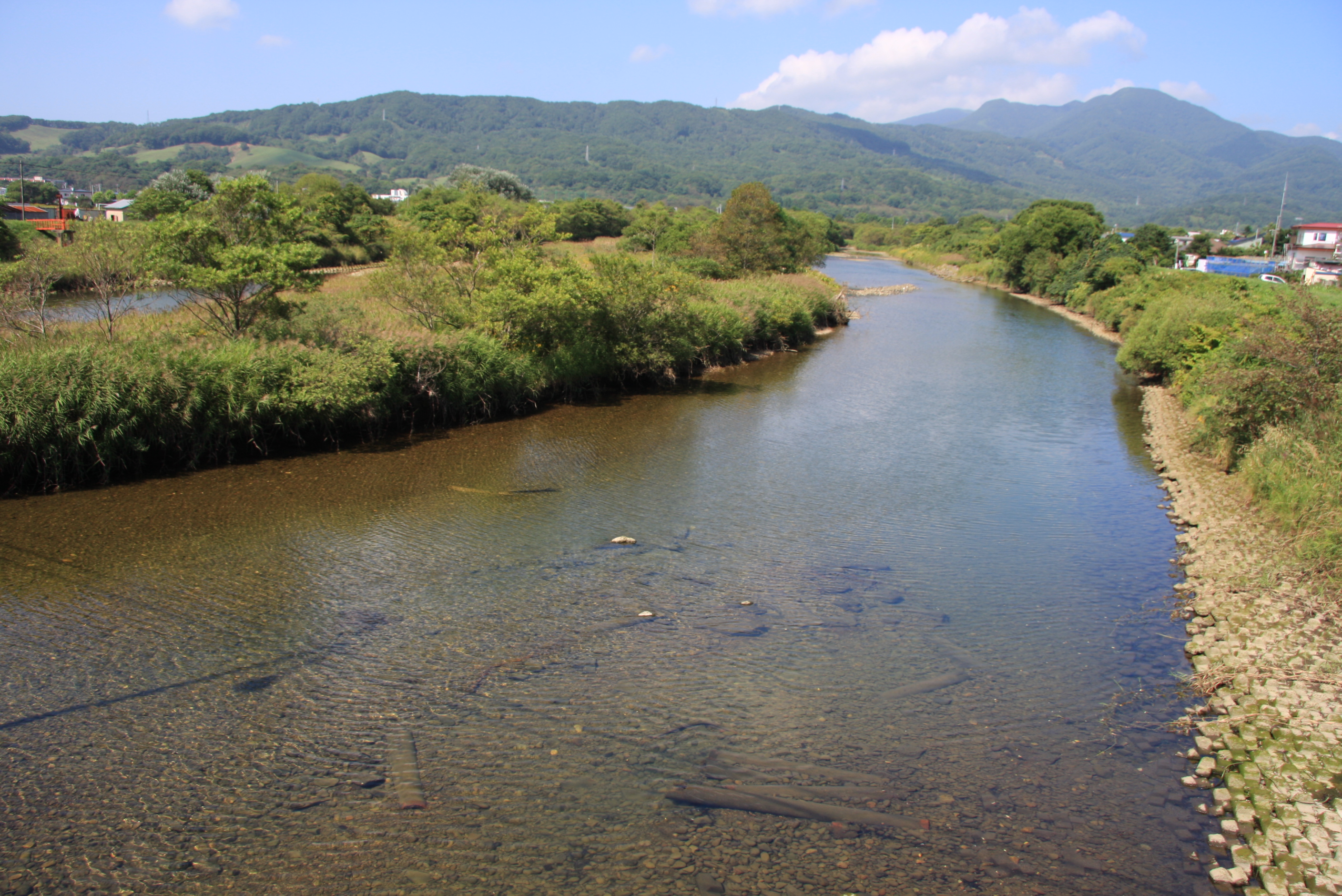 胆振幌別川（登別市） 来福橋より上流を望む